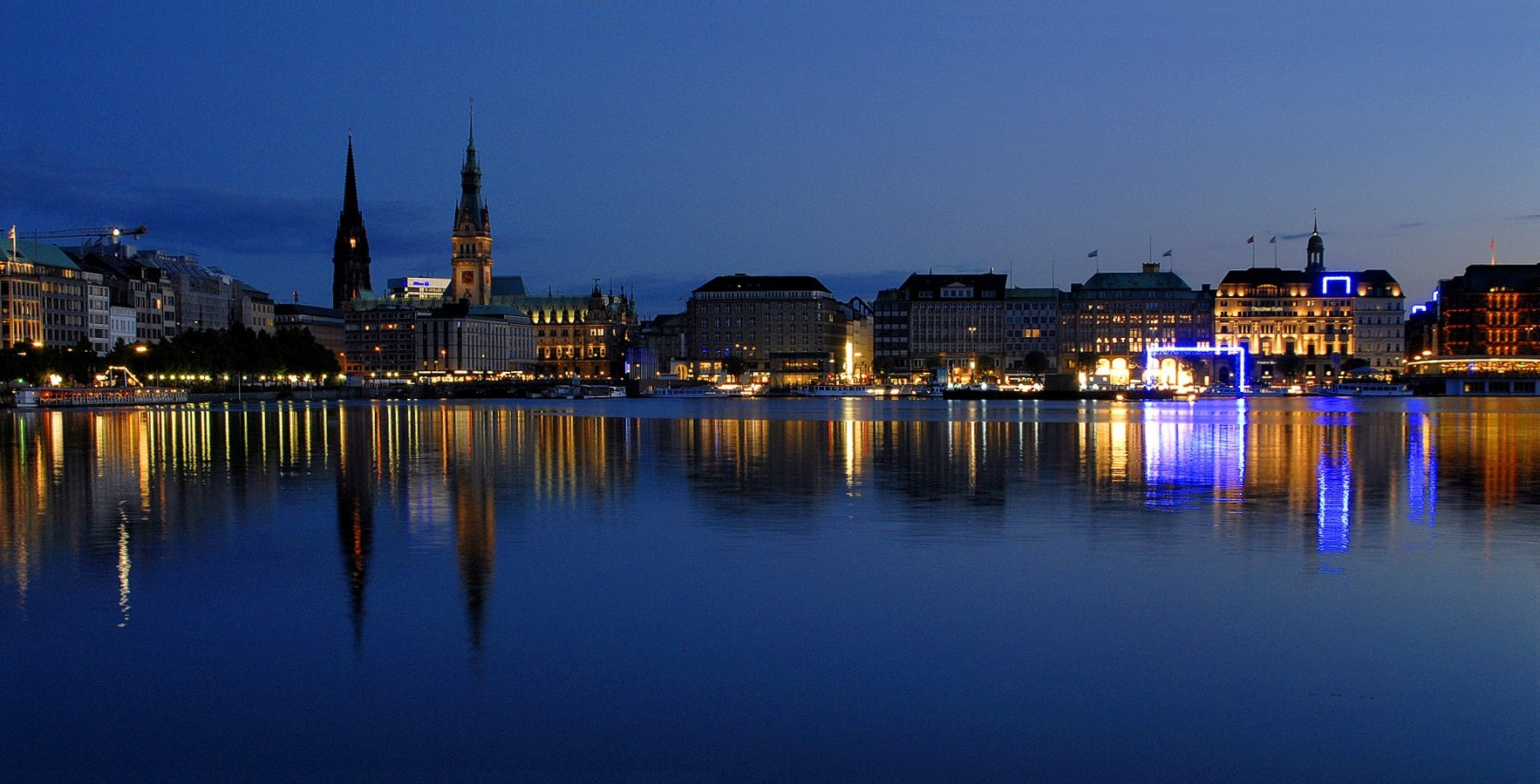 Quelle: achim conring Bildbeschreibung: Die Binnenalster mit Blue Goals